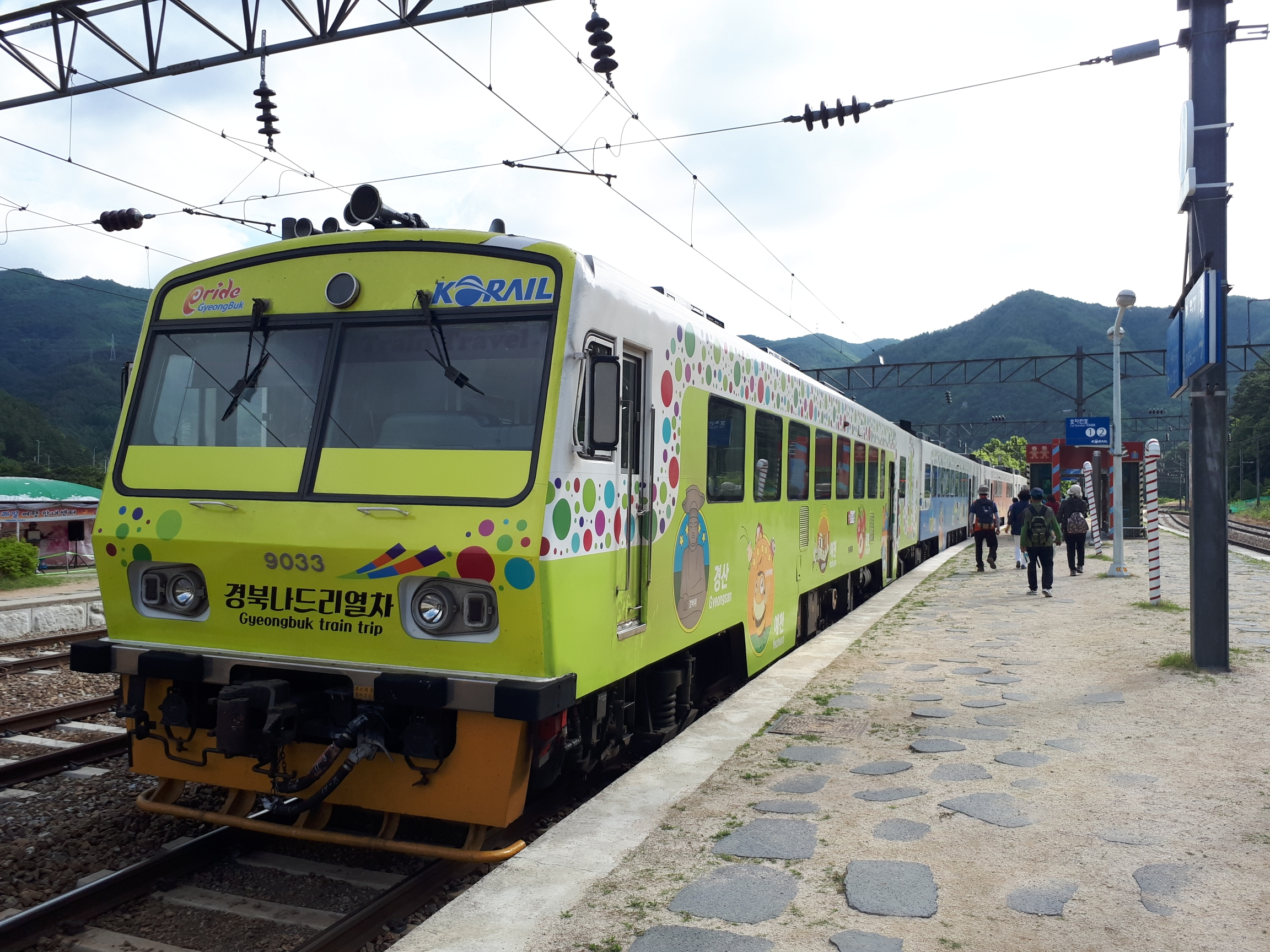 분천역에 정차하고 있는 경북나드리열차.